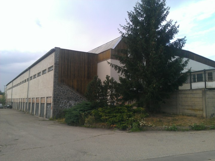 Zimní stadion Rosice, zadní strana budovy, rok 2018